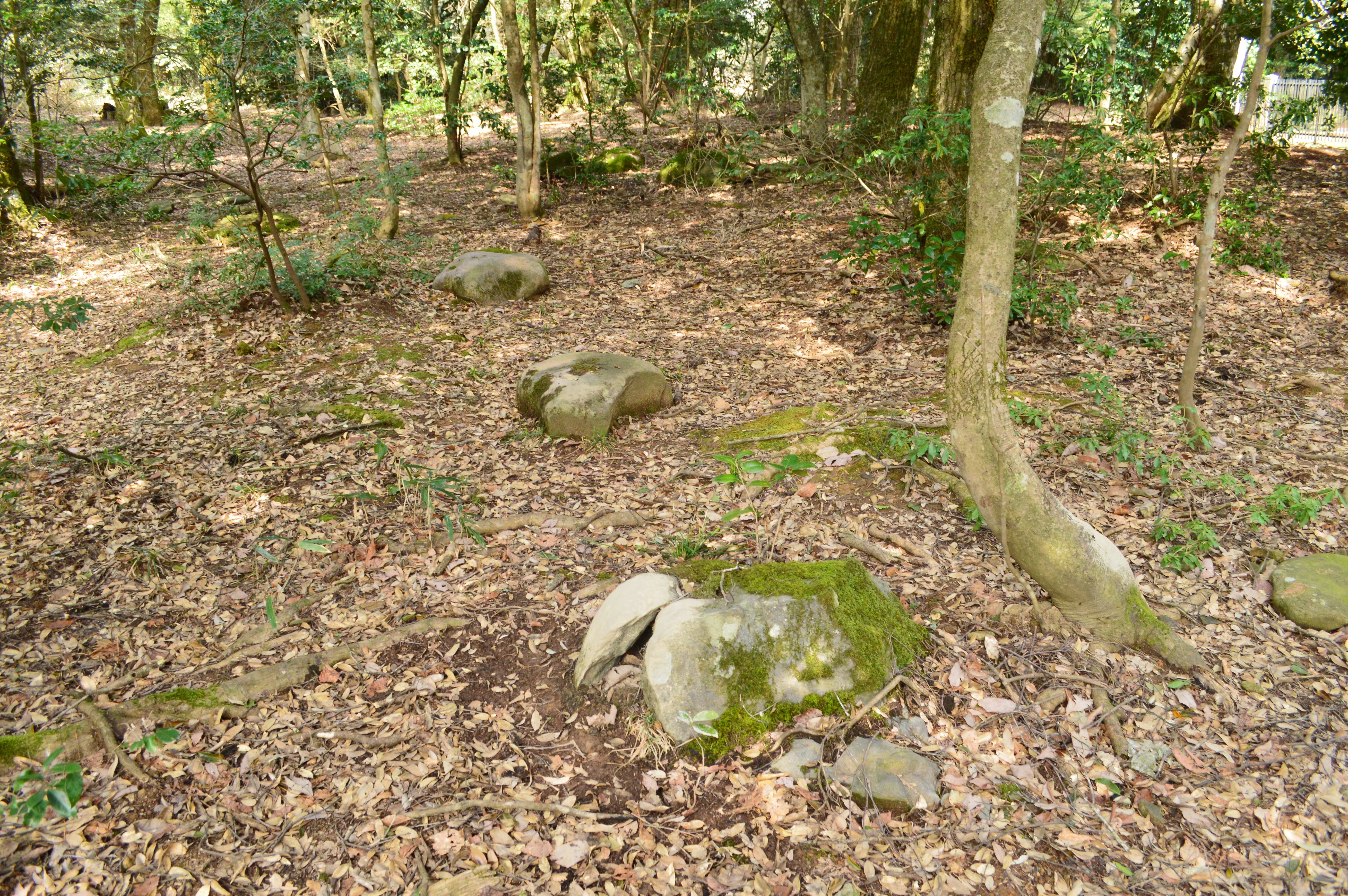 岡益廃寺 礎石 Nikon D3200